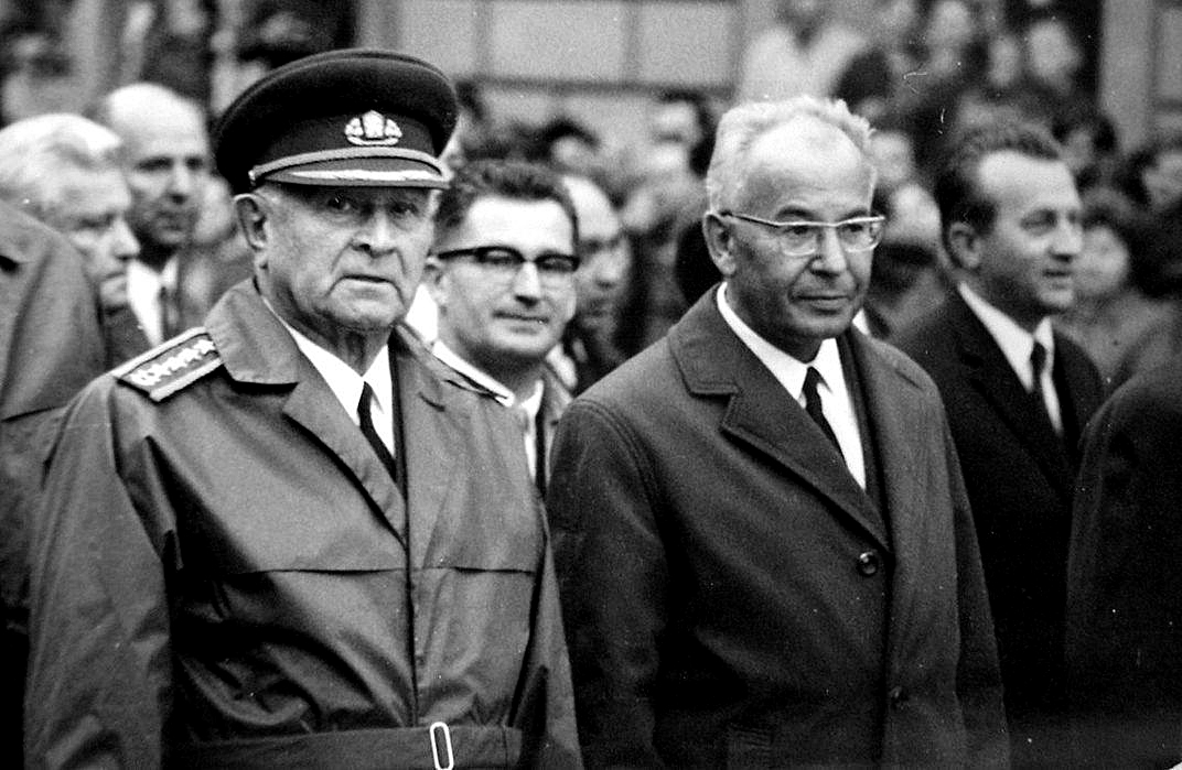 Prezident ČSSR generál Ľudvík Svoboda s Gustávom Husákom pri 25. výročí Slovenského národného povstania v Banskej Bystrici